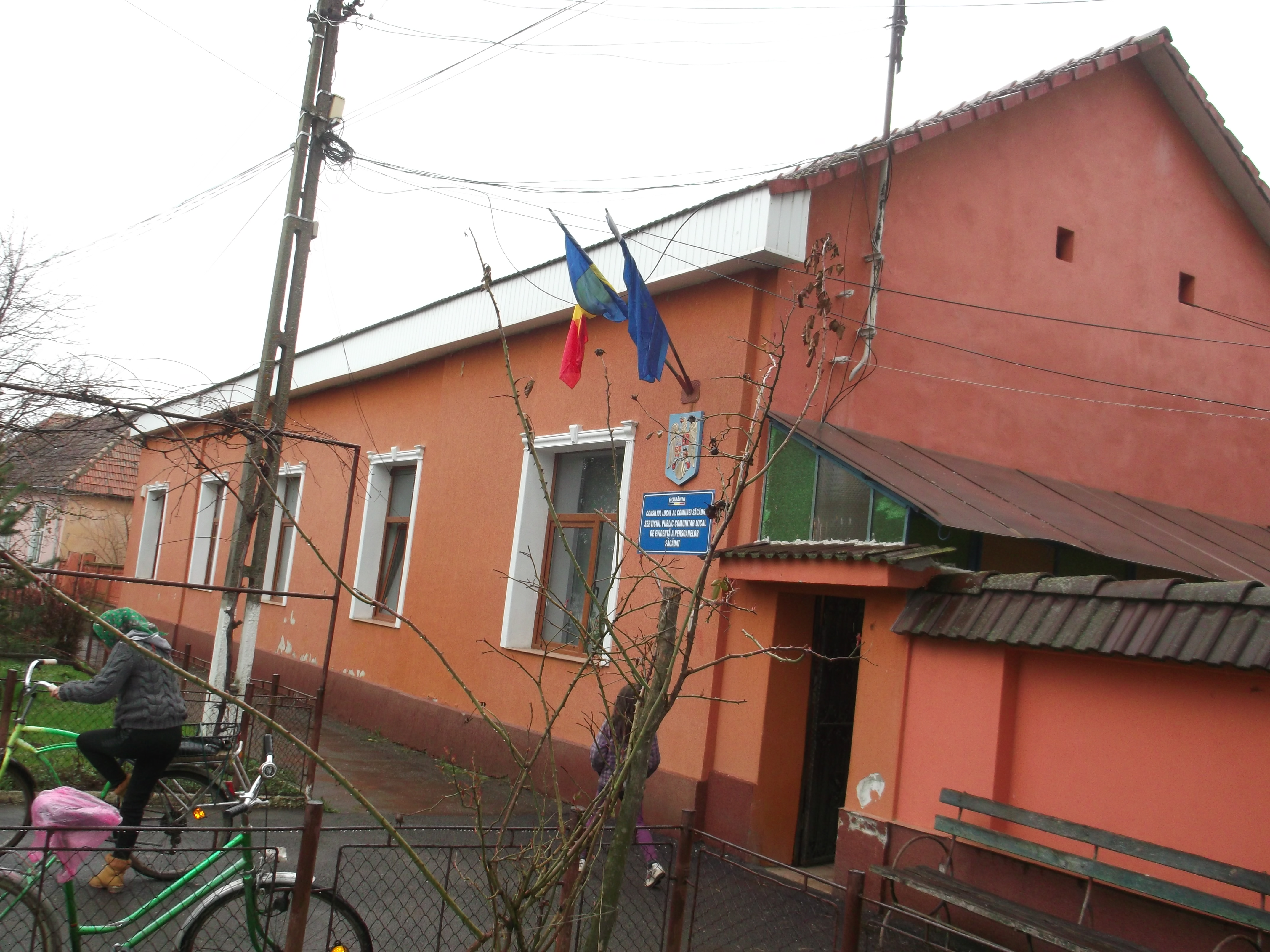 Primaria comunei Sacadat , jud. Bihor